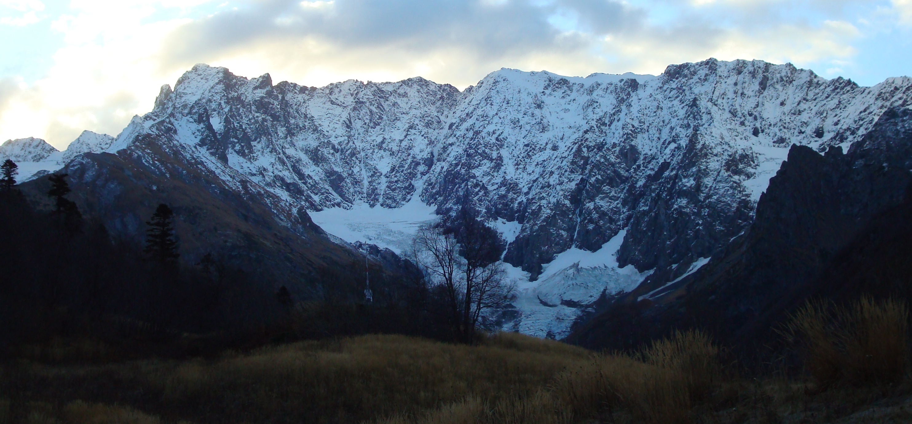 На фото представлен вид на массив горы Псеашхо из лагеря Холодный. Иллюстрирует статью "Псеашхо"